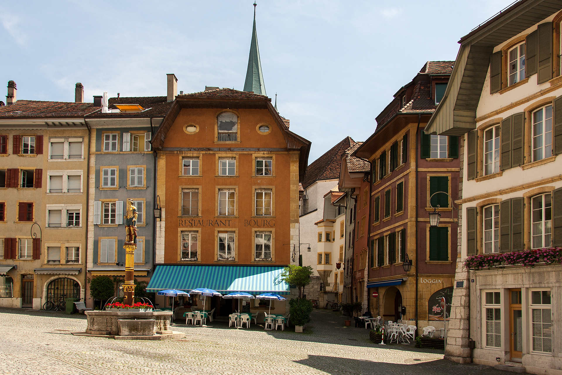 Burgplatz in Biel